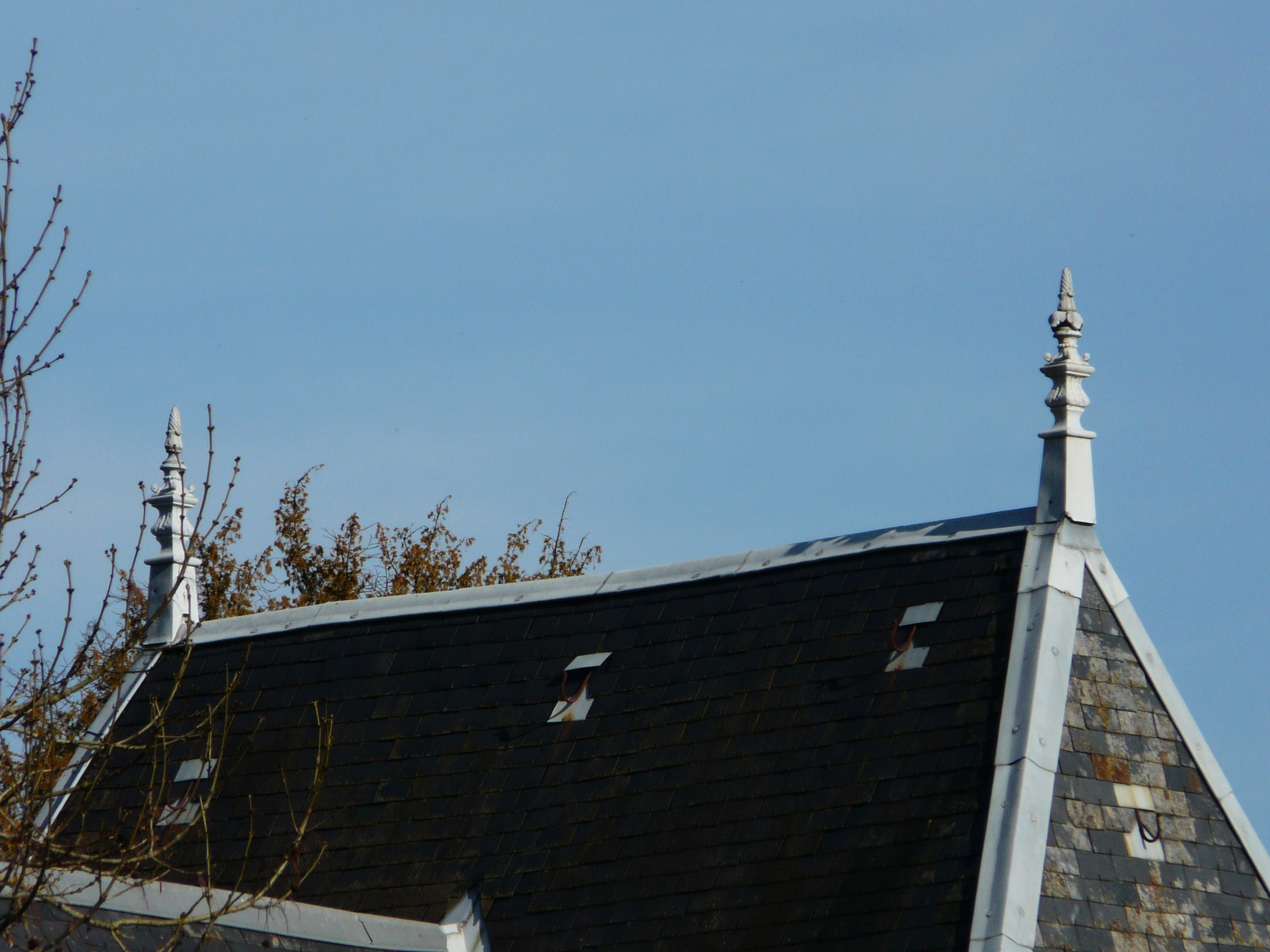 Les épis de faîtage du manoir du Puy, Eyliac, Dordogne, France.